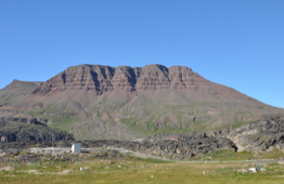 Lyngmarksfjeldet i Qeqertarsuaq